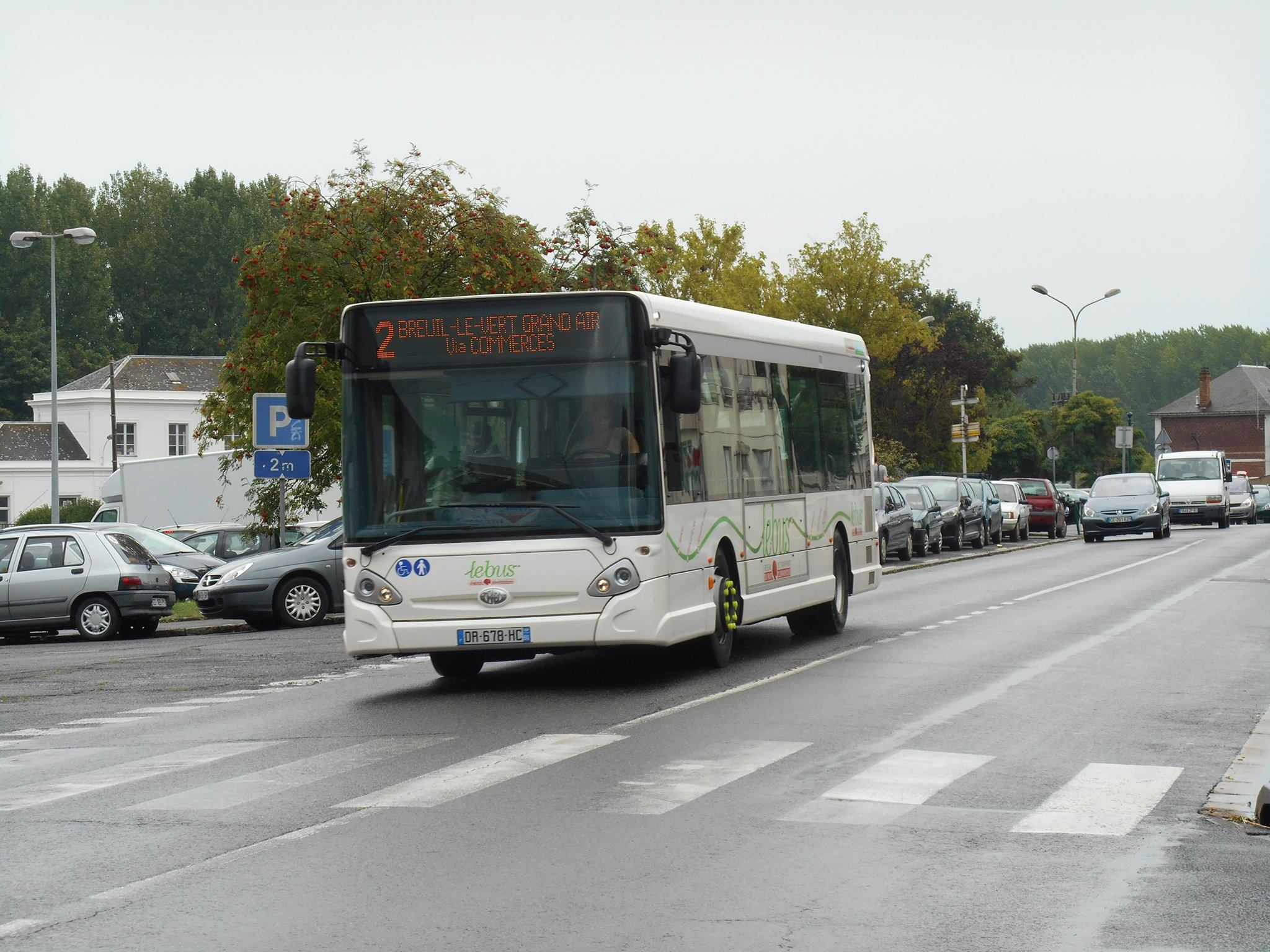 Heuliez GX 137 Keolis Oise